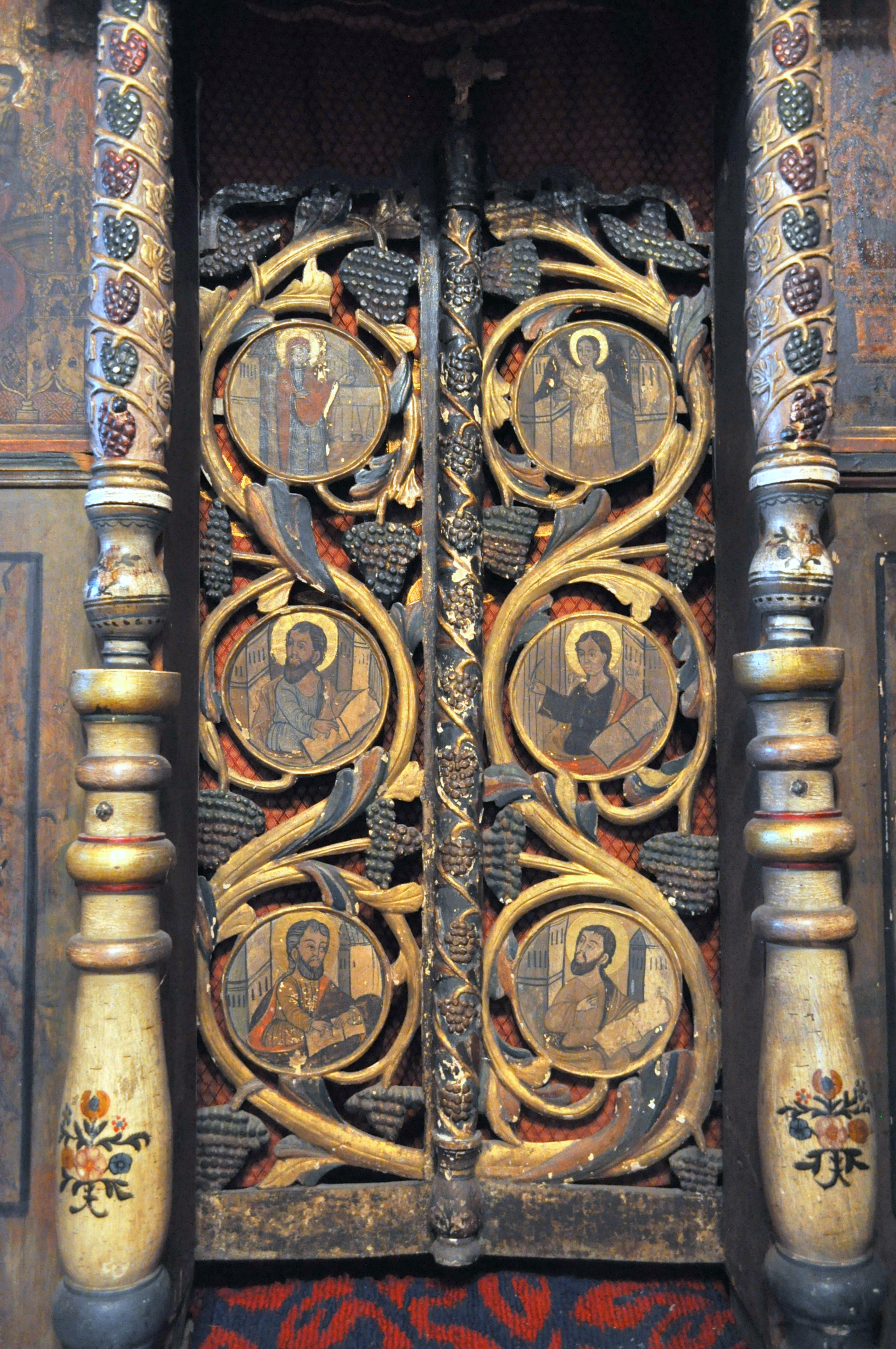 Biserica de lemn „Sfinții Arhangheli” din Reghin, județul Mureș